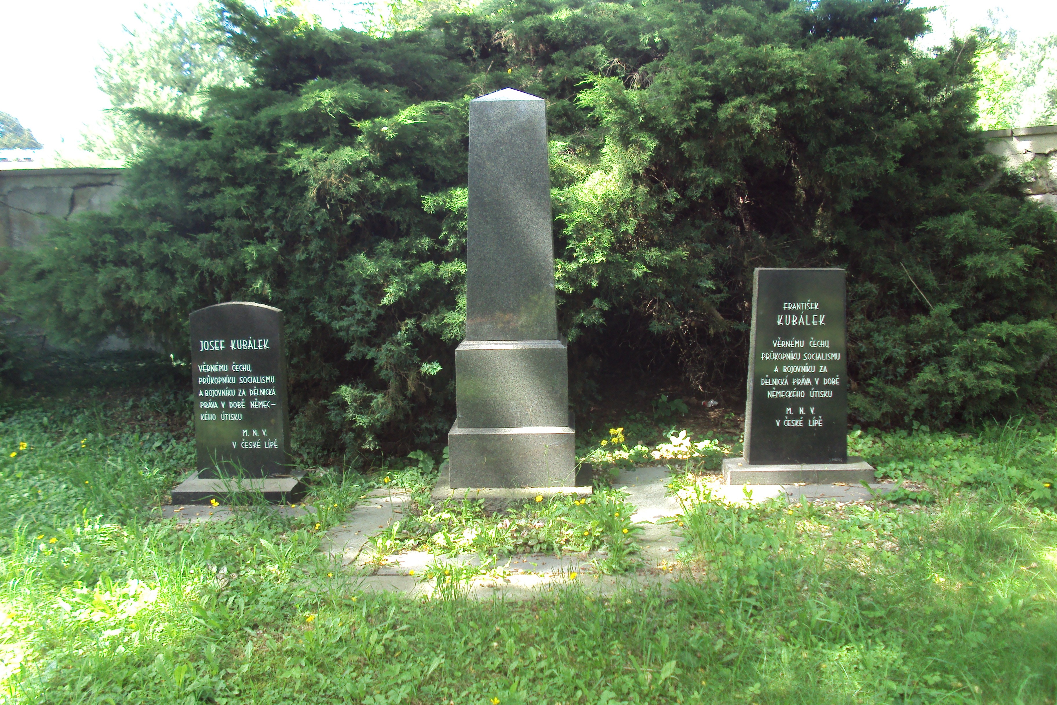 Hroby soudruhů Kubálkových na českolipském hřbitově